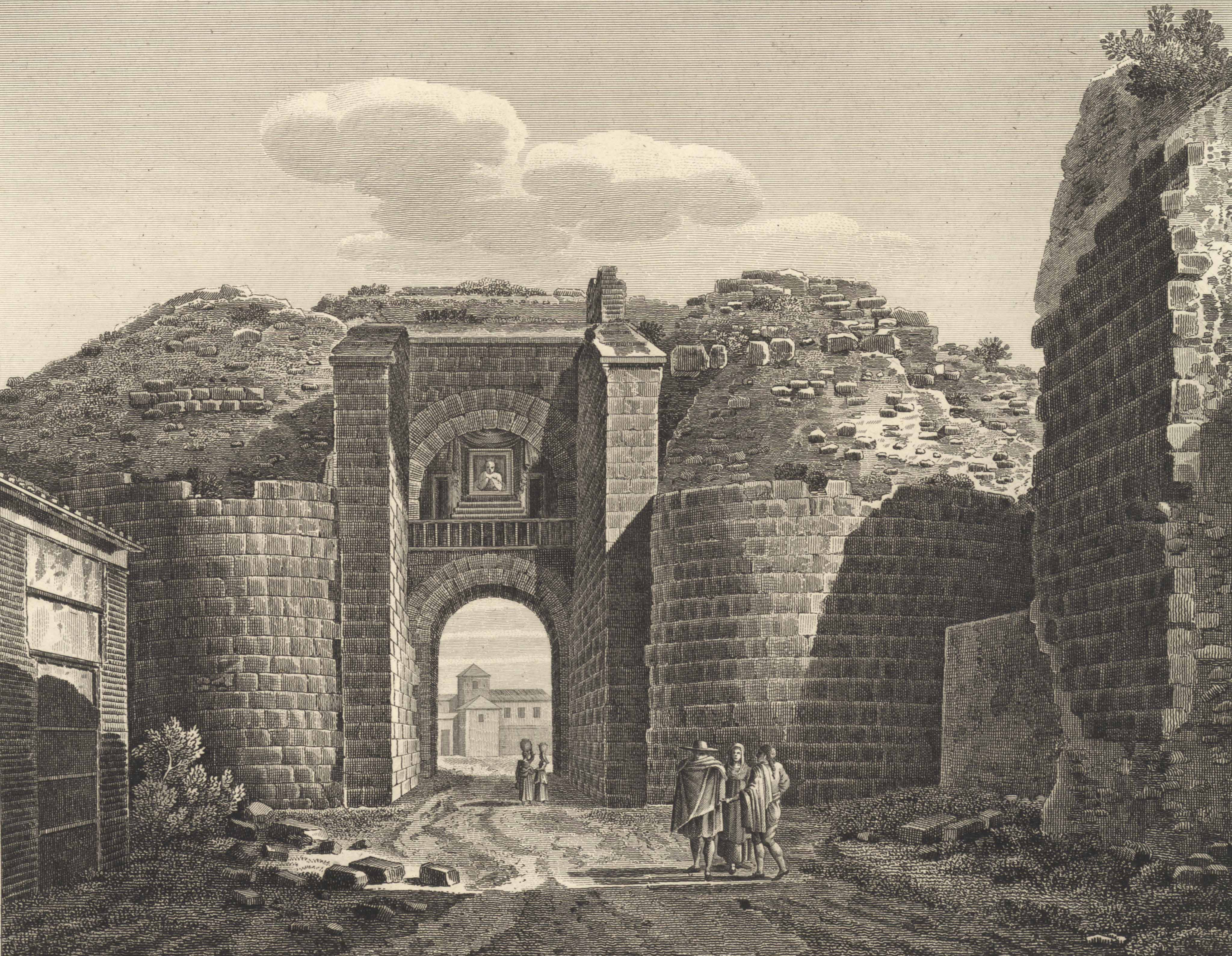 Puerta árabe en Segovia. Puerta de Talavera de la Reyna.